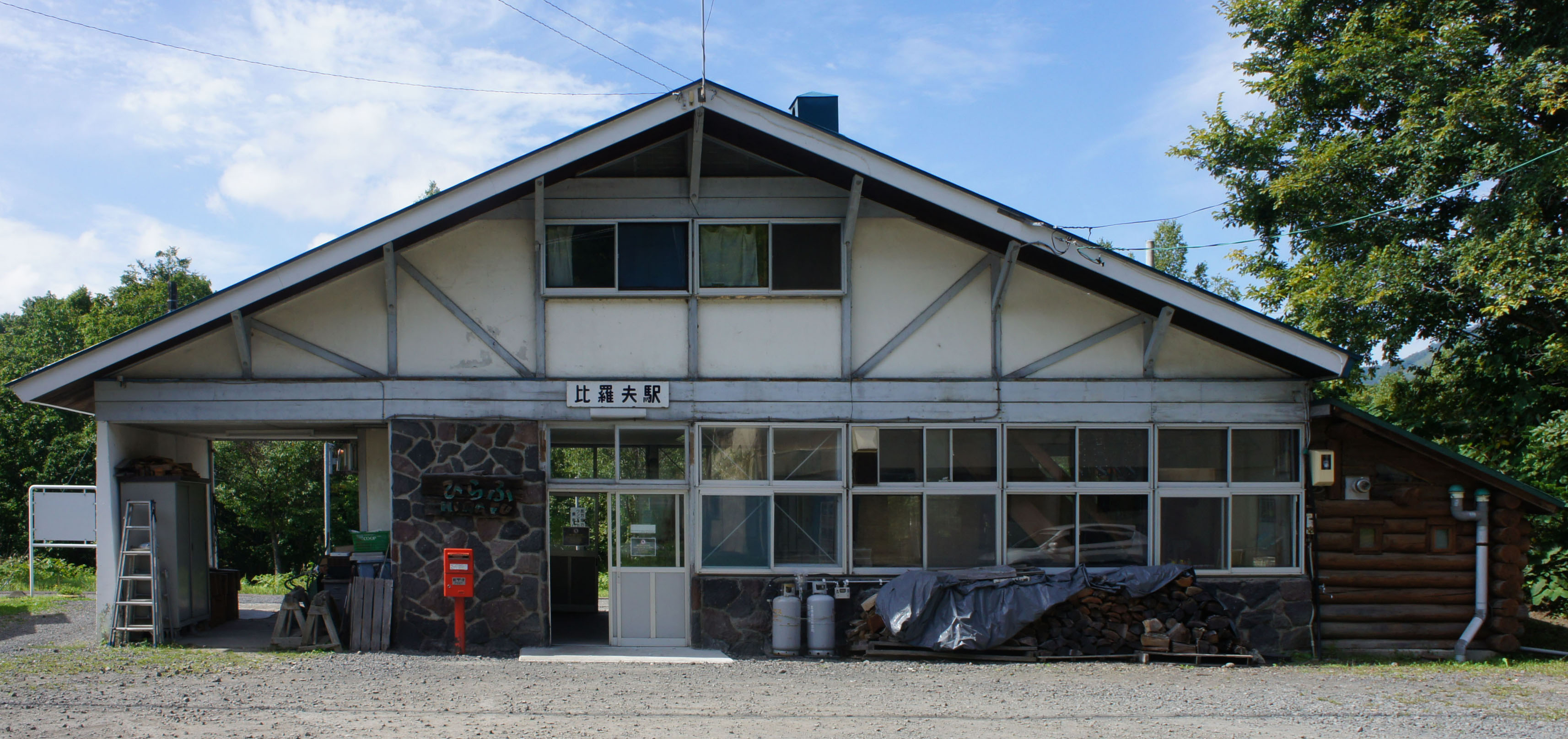 JR函館本線・比羅夫駅の駅舎 Sony NEX-3